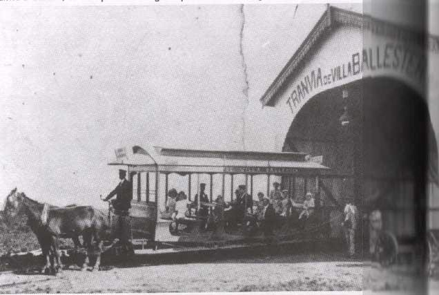 Antigua estacion de Tranvías de Villa Ballester, 1912.